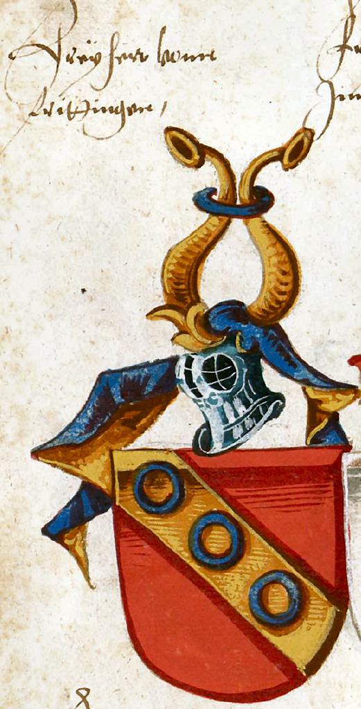 Wappen der Familie von Entringen.